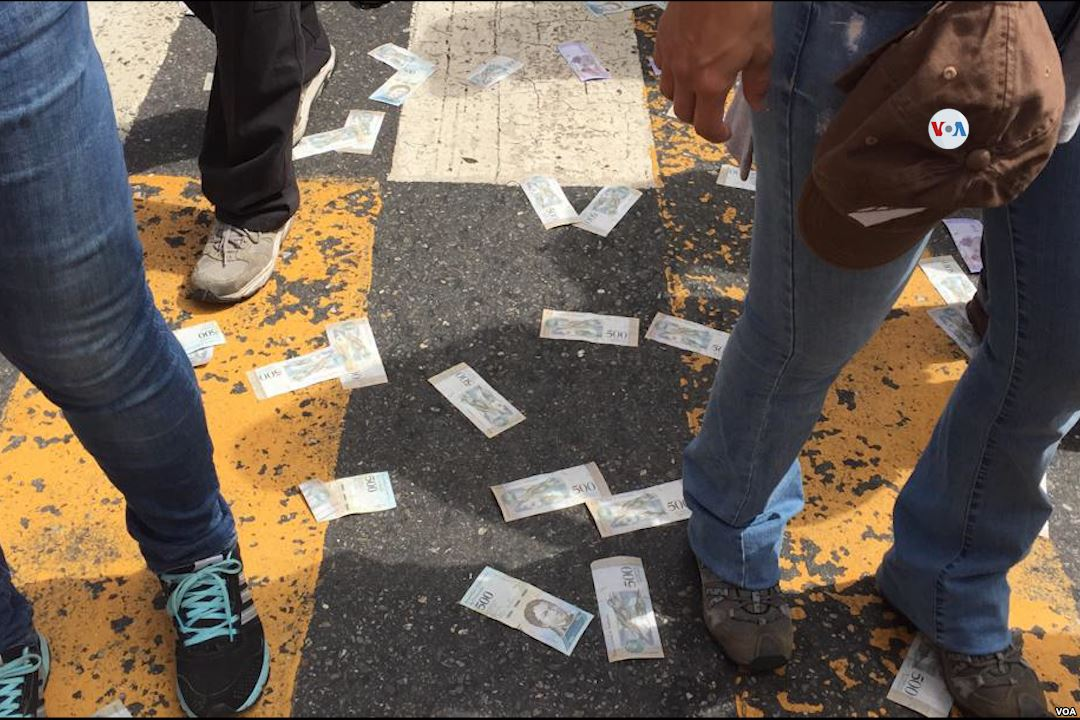 Bolívares devaluados tirados en el piso durante la protesta como símbolo de la hiperinflación y la crisis económica que atraviesa Venezuela.